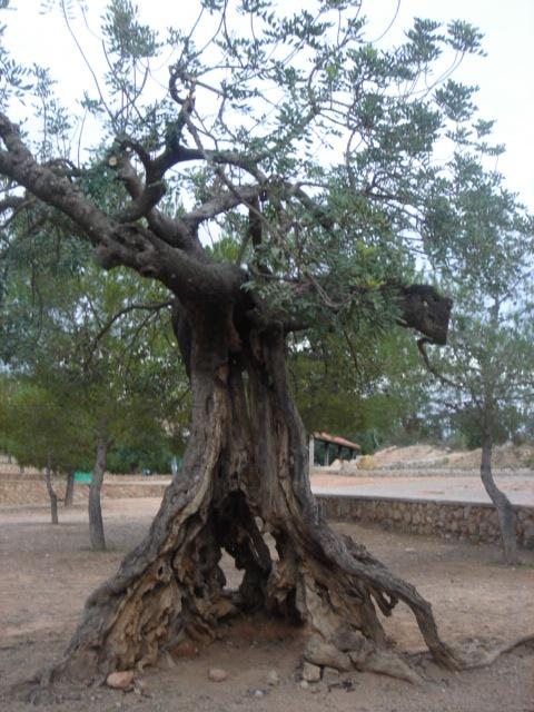 Autor: Joseaperez